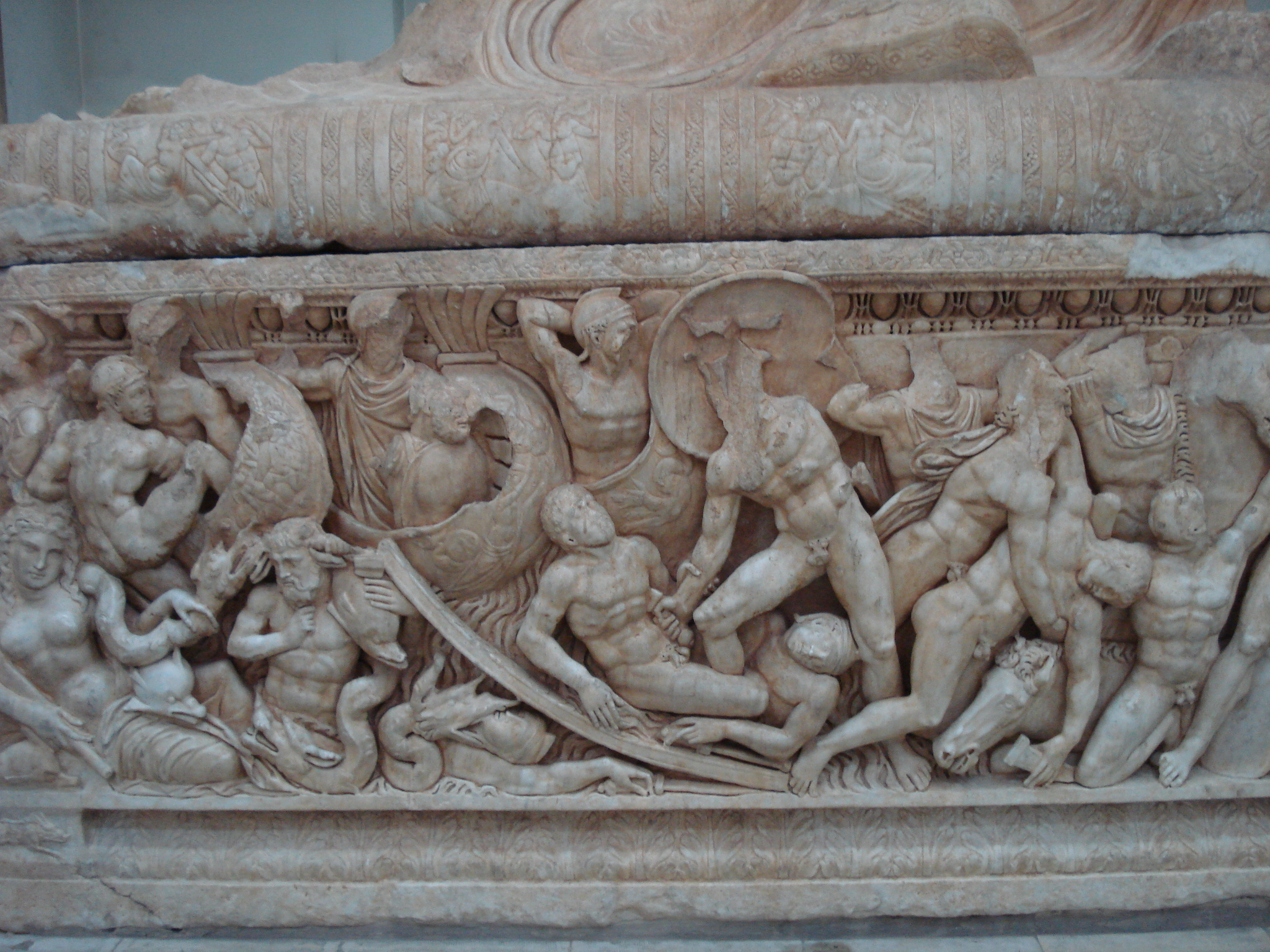 ناووس روماني يعود للقرن الثالث ميلادي و جد في منطقة الرستن في سورية,محفوظ في متحف دمشق الوطني